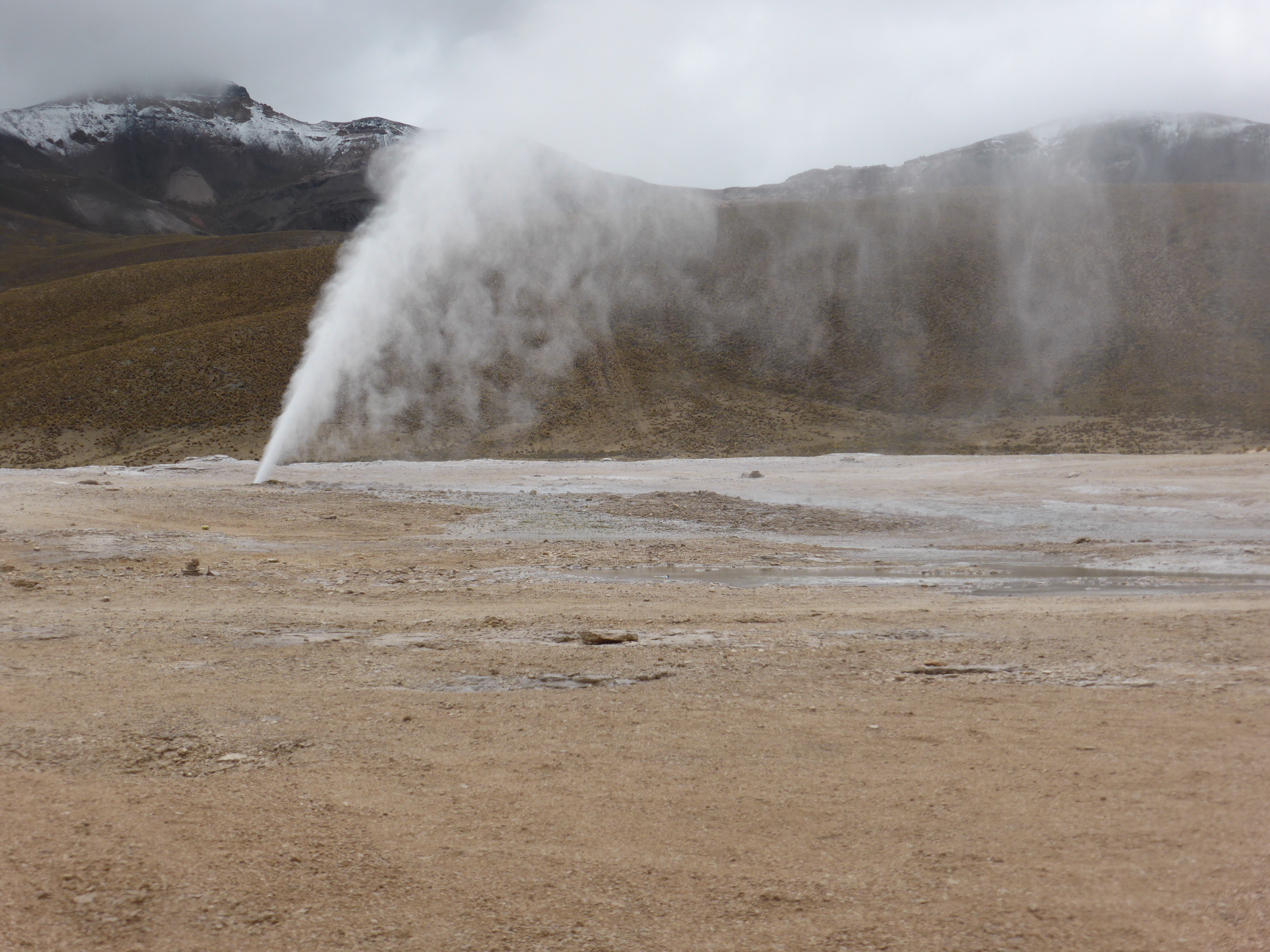 En Puchuldiza hay varios géiseres activos, emitiendo columnas de agua y vapor. Es en el altiplano chileno, a más de 4.000 metros de altura sobre el nivel del Pacífico. Parque nacional Volcán Isluga.